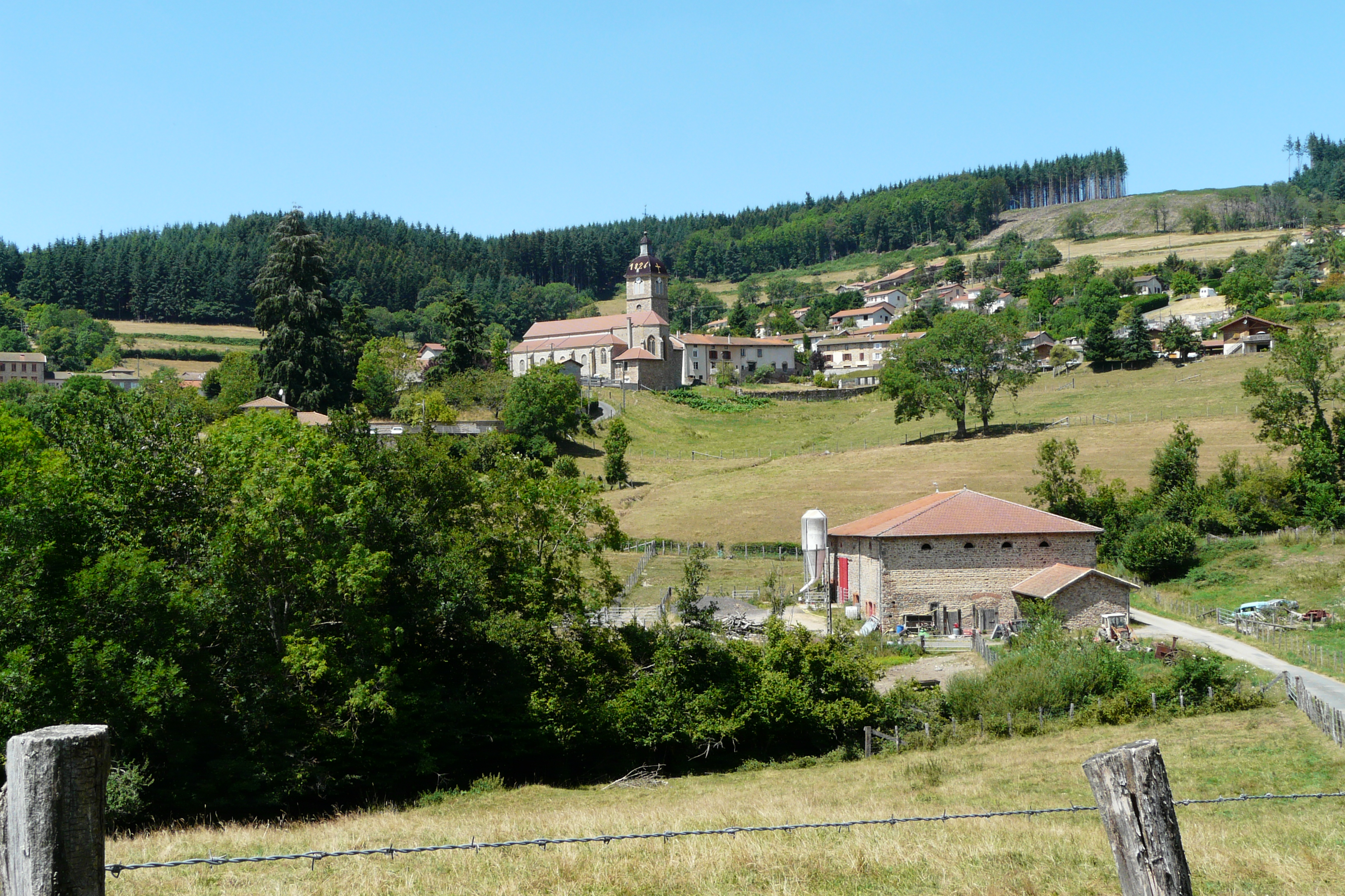 Saint-Bonnet-le-Troncy (Rhône) en montant sur le chemin de la Croix du Sud